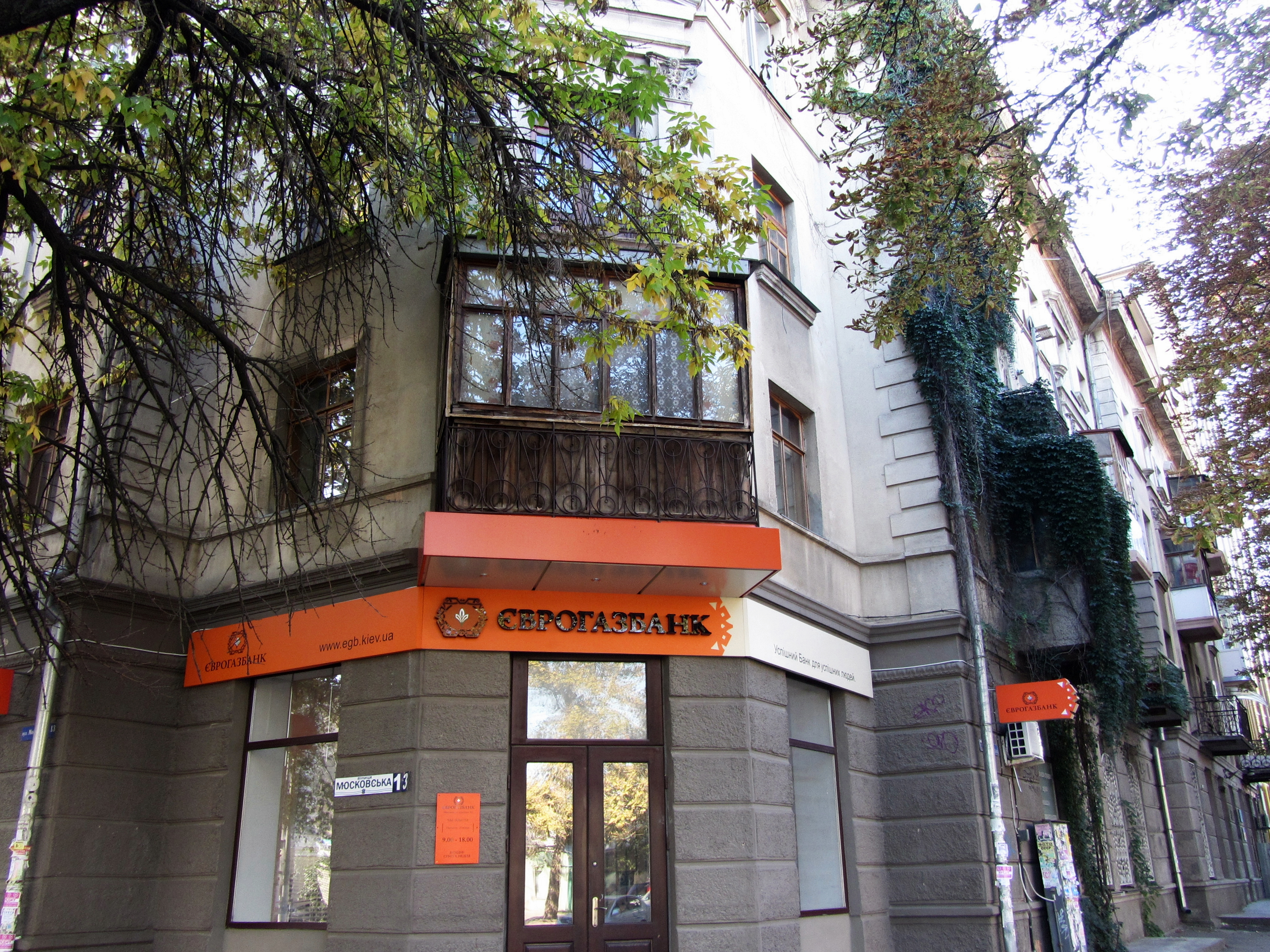 Житловий будинок, Миколаїв, вул. Московська, 13